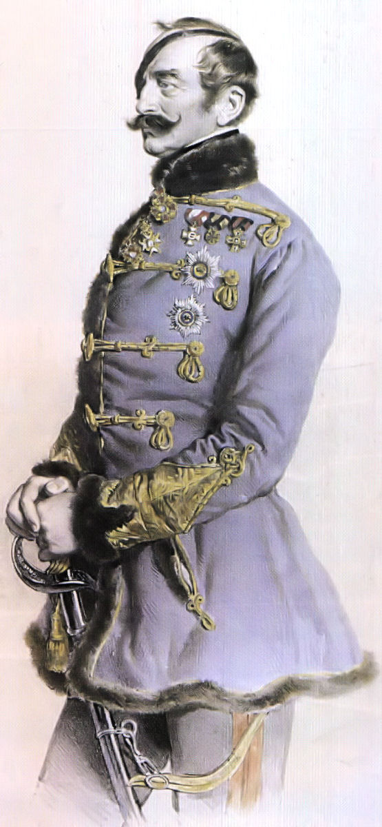 Franz von Schlik – Lithographie von Joseph Kriehuber, 1849 – scanned by User:Csanády